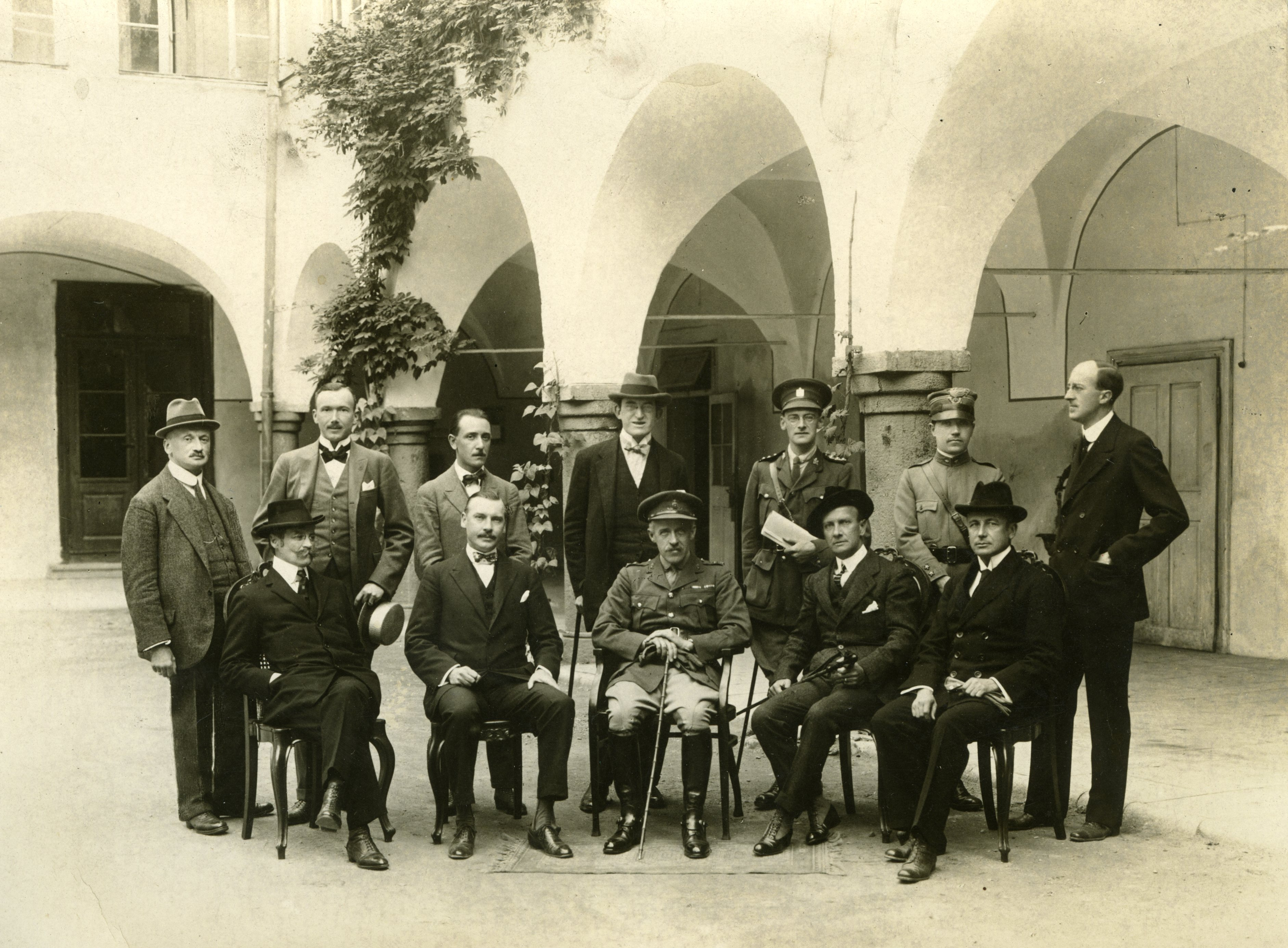 Plebiscitna komisija koroškega plebiscita